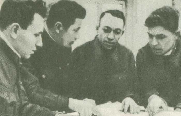 Командиры партизанских соединений А.Ф. Федоров и С.Ф. Маликов, комиссары В.Н. Дружинин и Л.Г. Бугаенко с начальником штаба Д.И. Рвановым обдумывают план удара по вражескому гарнизону в Ковеле